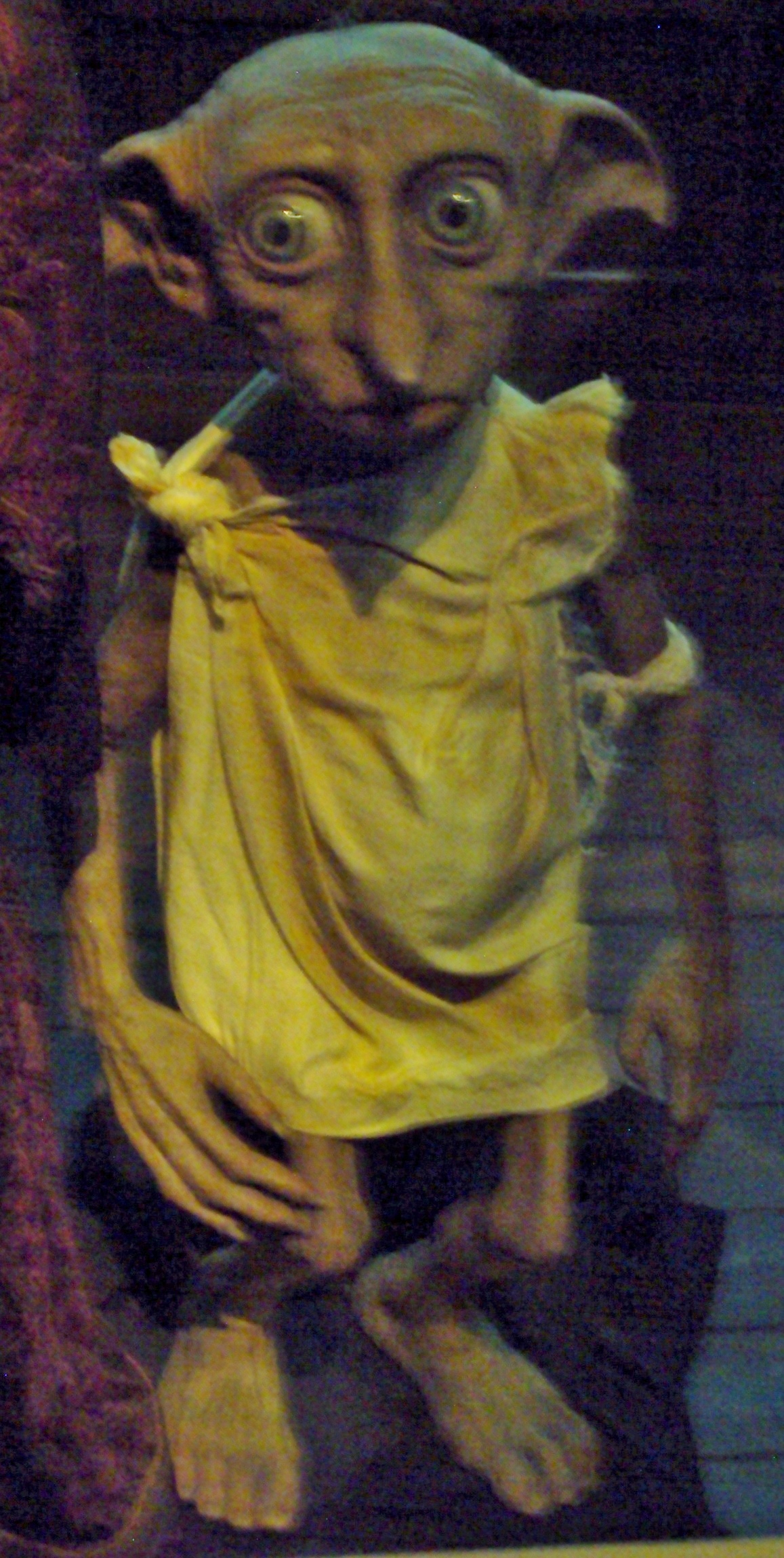 Huis-elf Dobby tijdens Harry Potter: The Exhibition in Brussel (België)